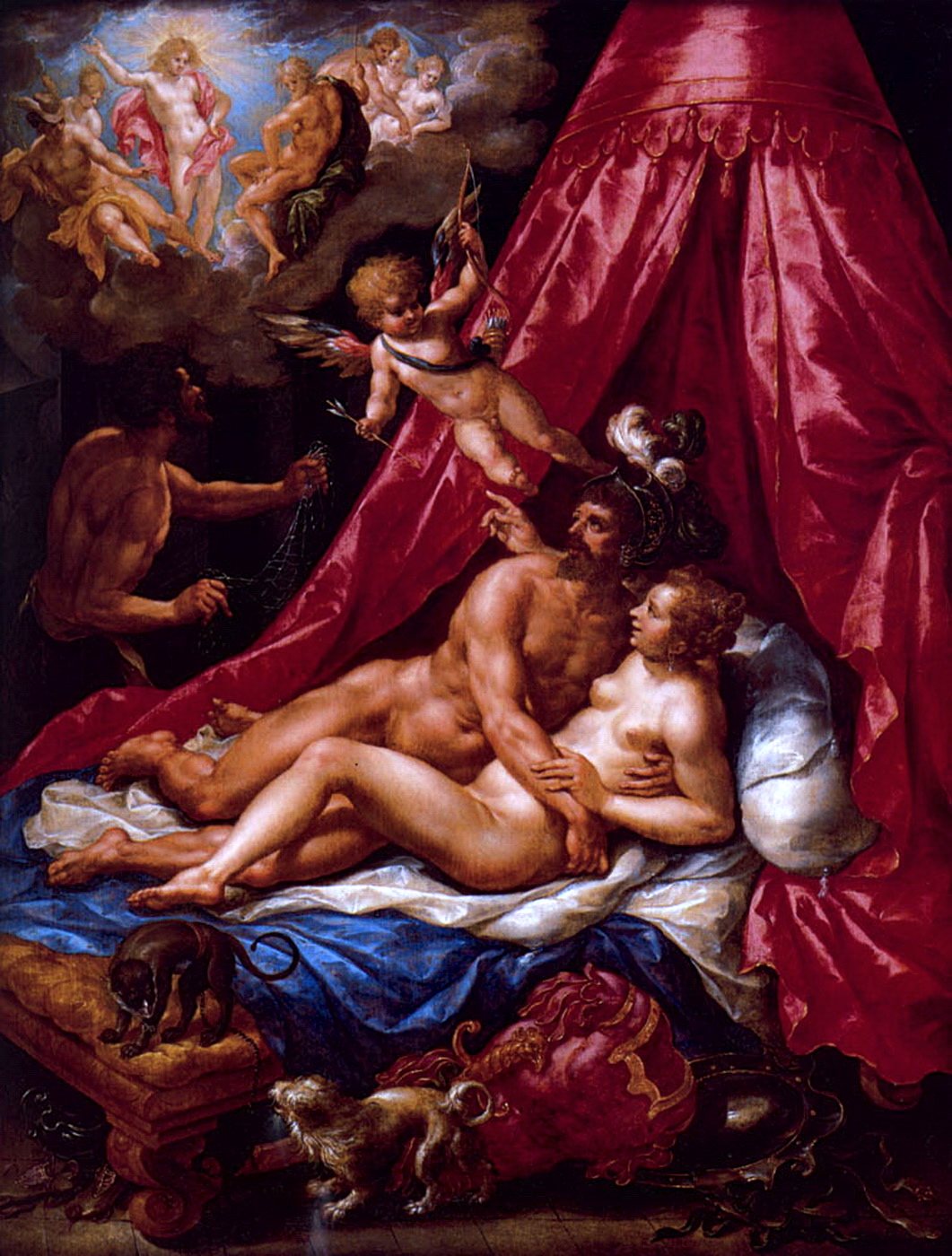 45.5 × 35.5 cm